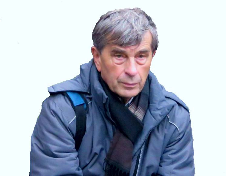 Ryszard Kotla